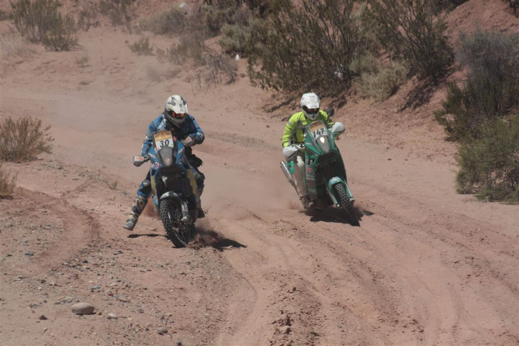 Rally Dakar 2009, etapa 4 Jacobacci Neuquén.